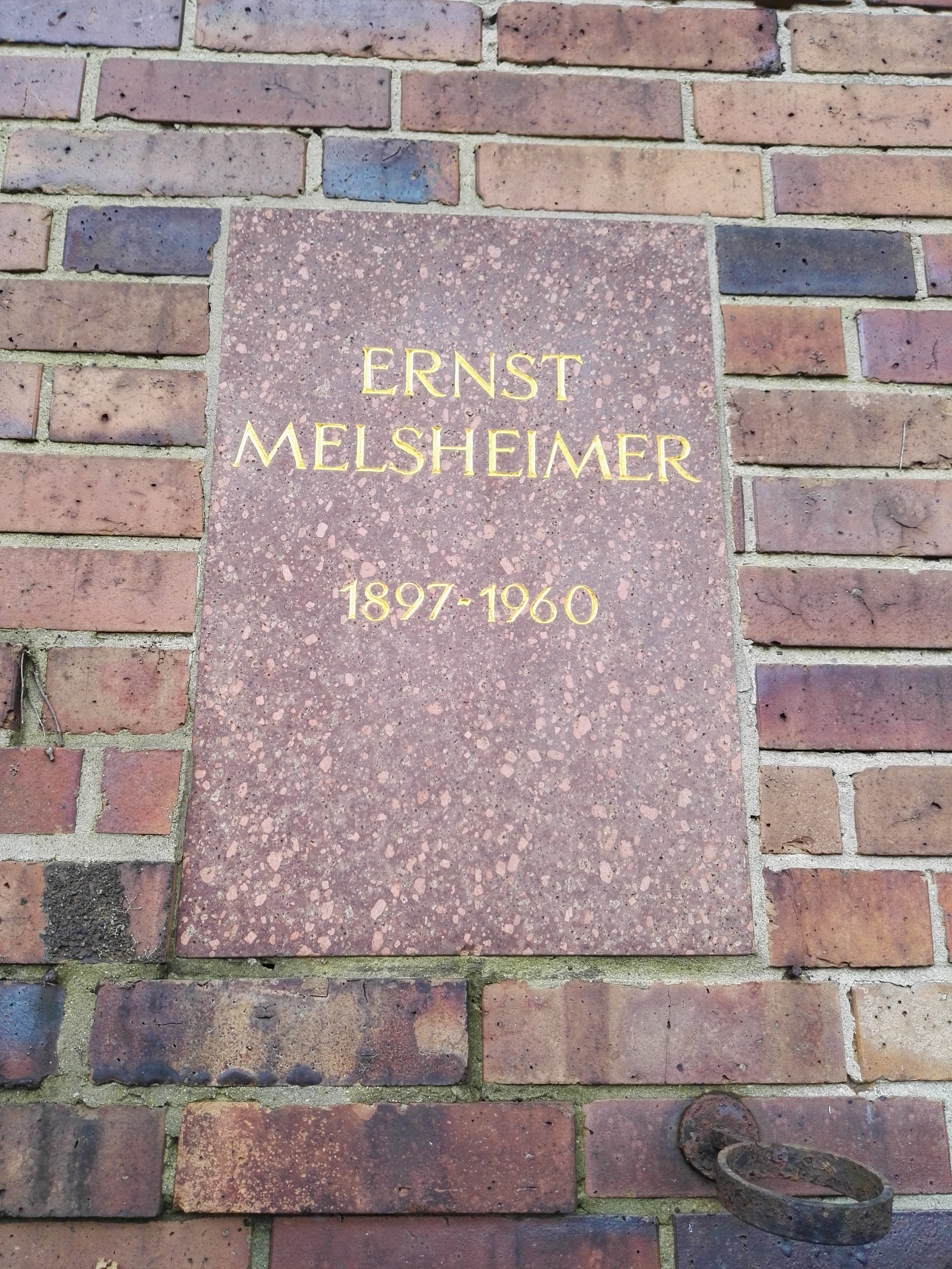 Grab von Ernst Melsheimer in der Gedenkstätte der Sozialisten auf dem Zentralfriedhof Friedrichsfelde in Berlin-Lichtenberg